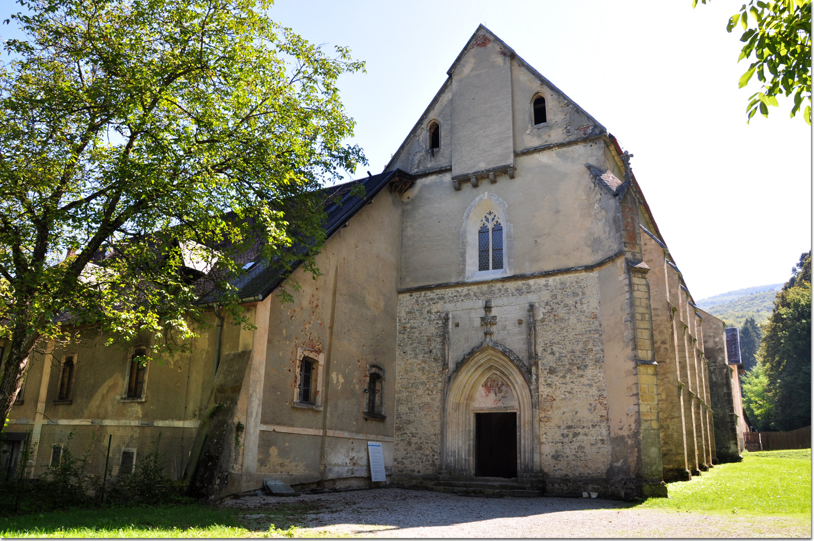 Pleterje (5)